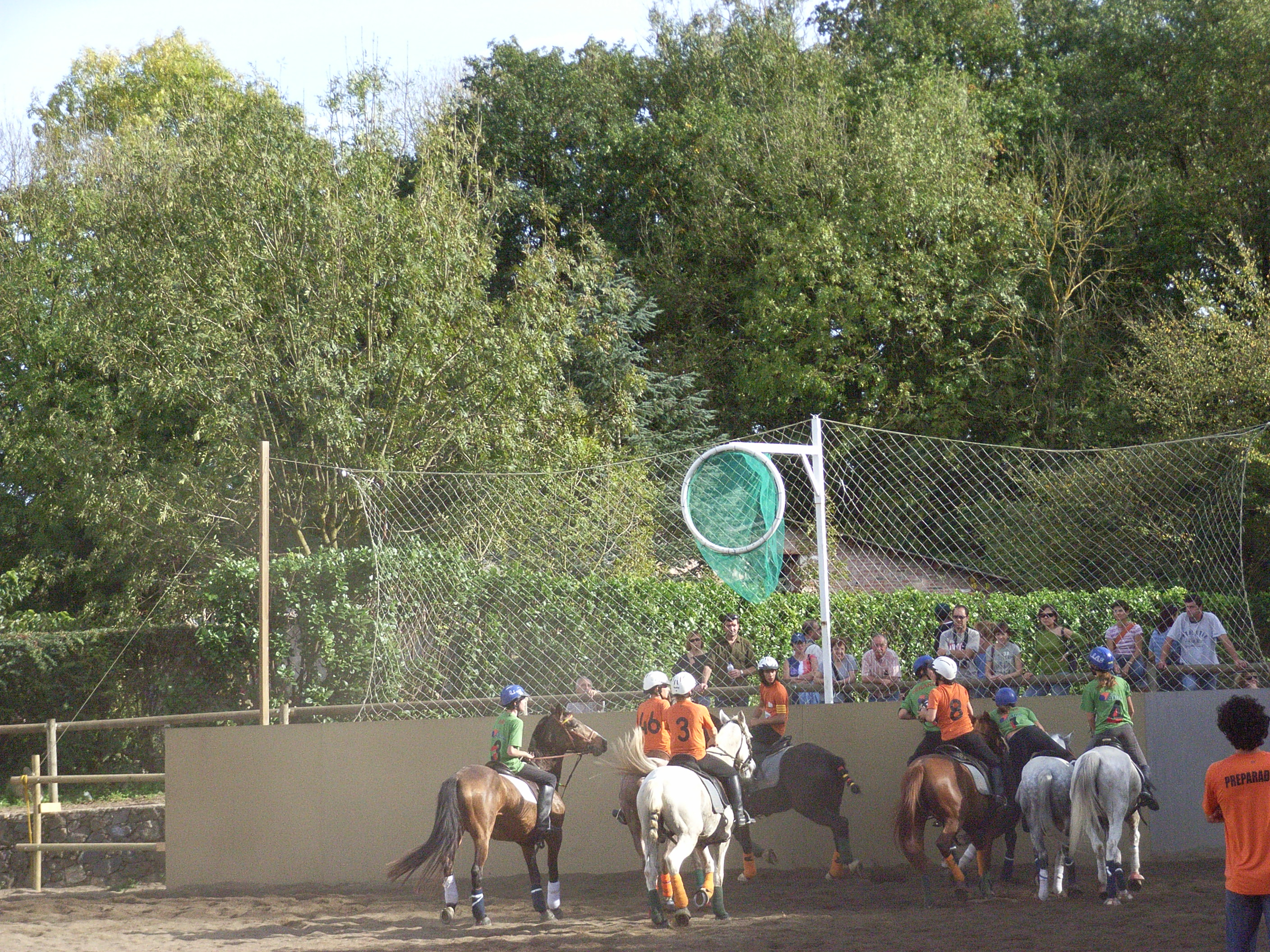 visió del camp de horseball